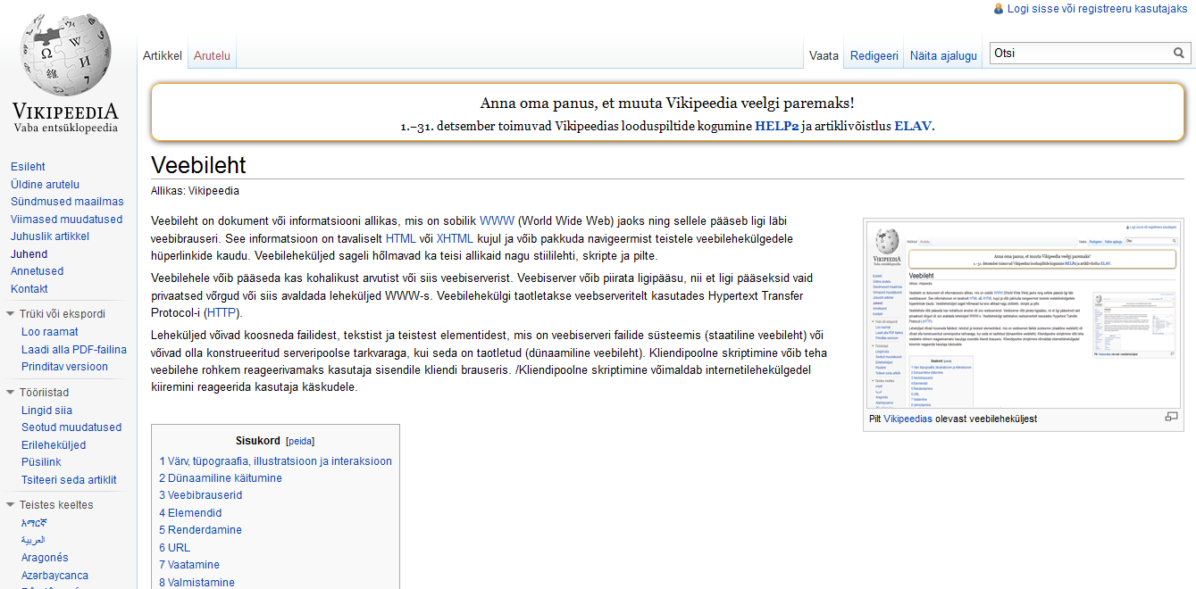 Pilt veebileheküljest